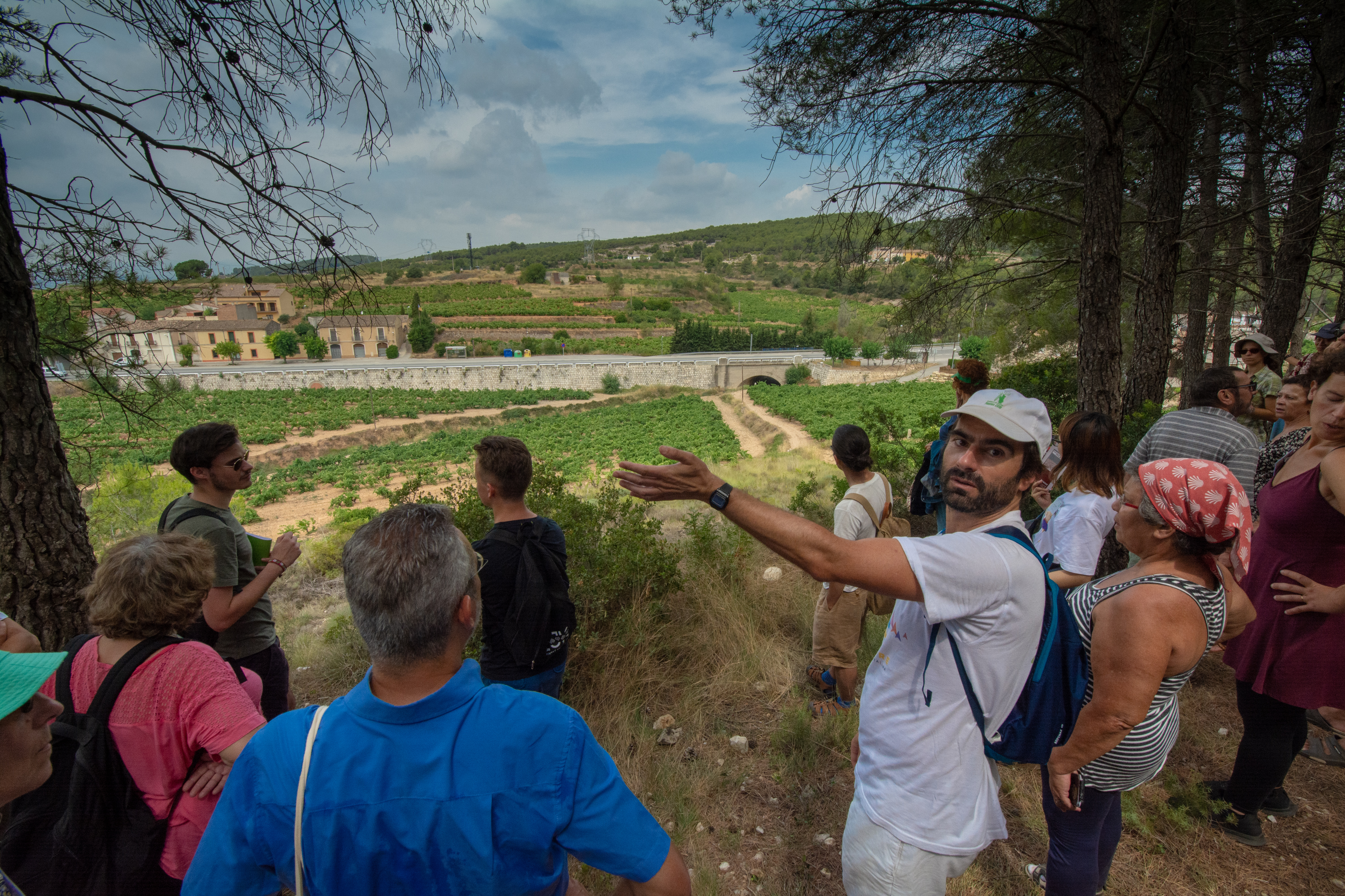 Ekskurso al la lasta defendolinio de Barcelono. SAT-Kongreso 2019